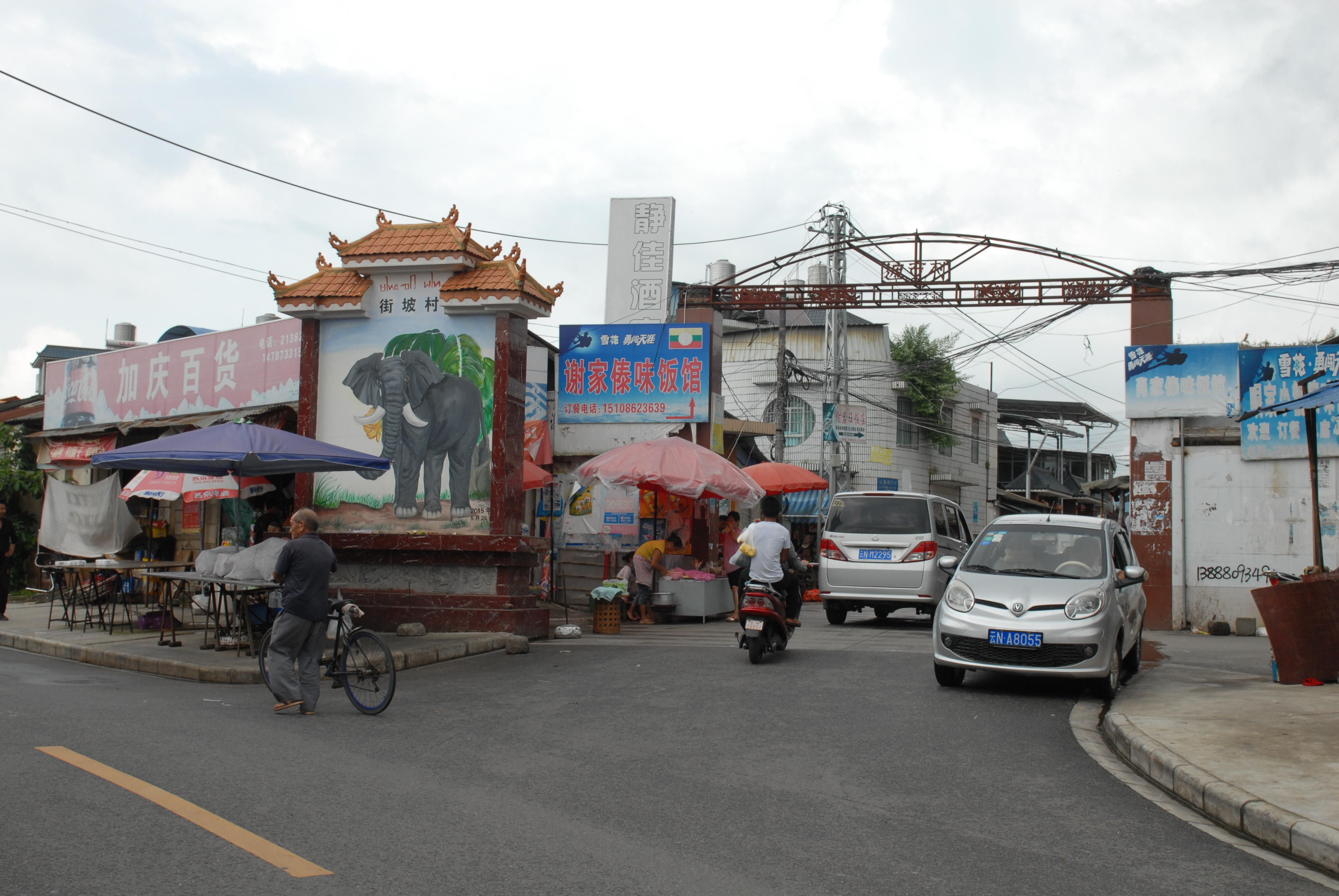 芒市镇街坡村